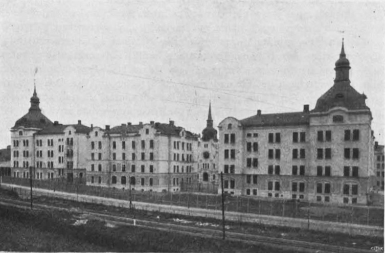 Stockholms stads arbetsinrättning vid Maria Bangata. Senare Vårdhemmet Högalid